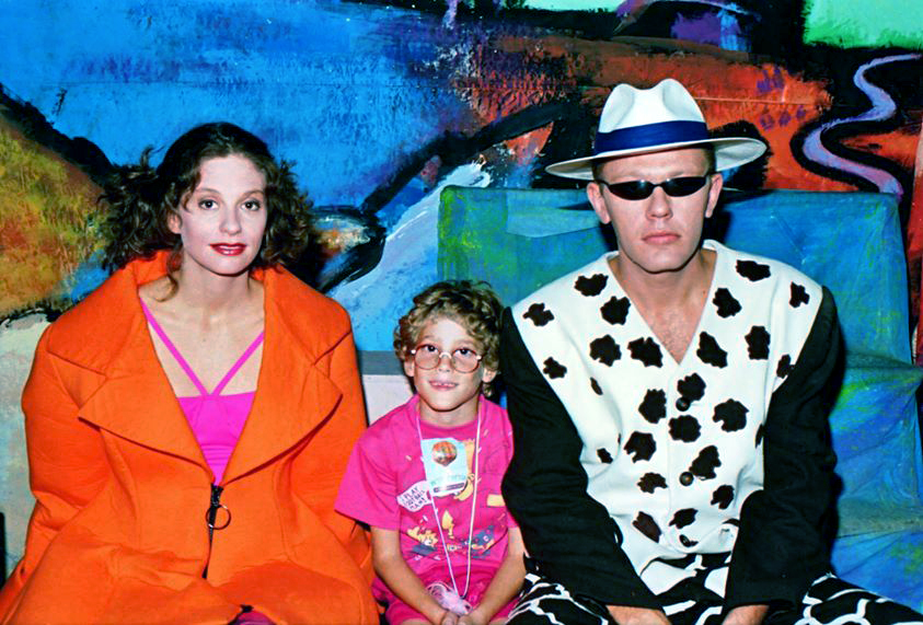 המנחים אביגיל אריאלי נתן ברנד